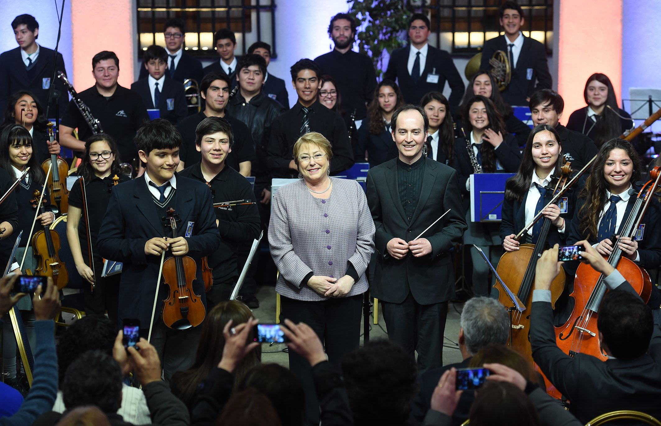 Gobierno de Chile